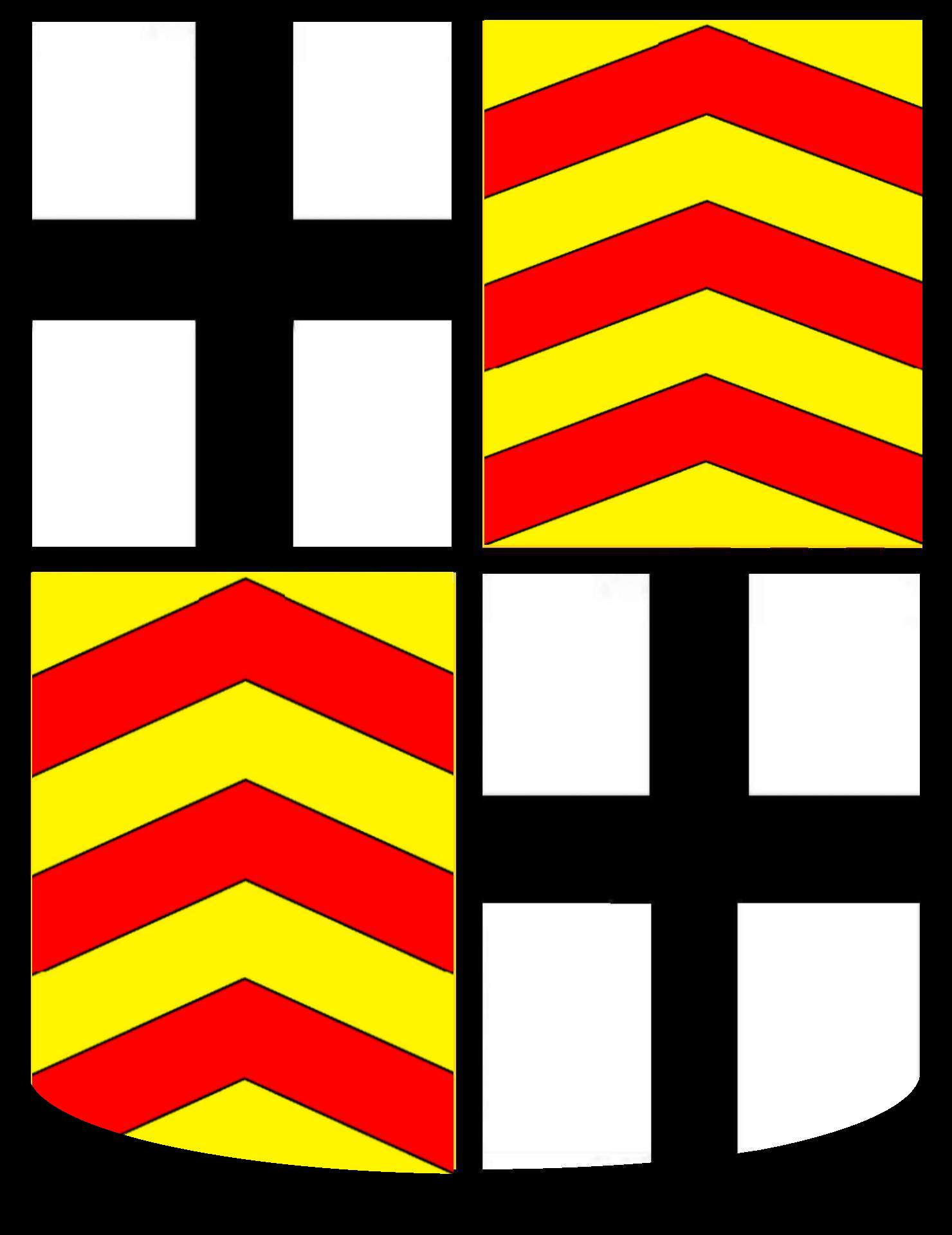 Wappen Heinrich V. Graf von Weilnau, Fürstabt von Fulda 1288–1313